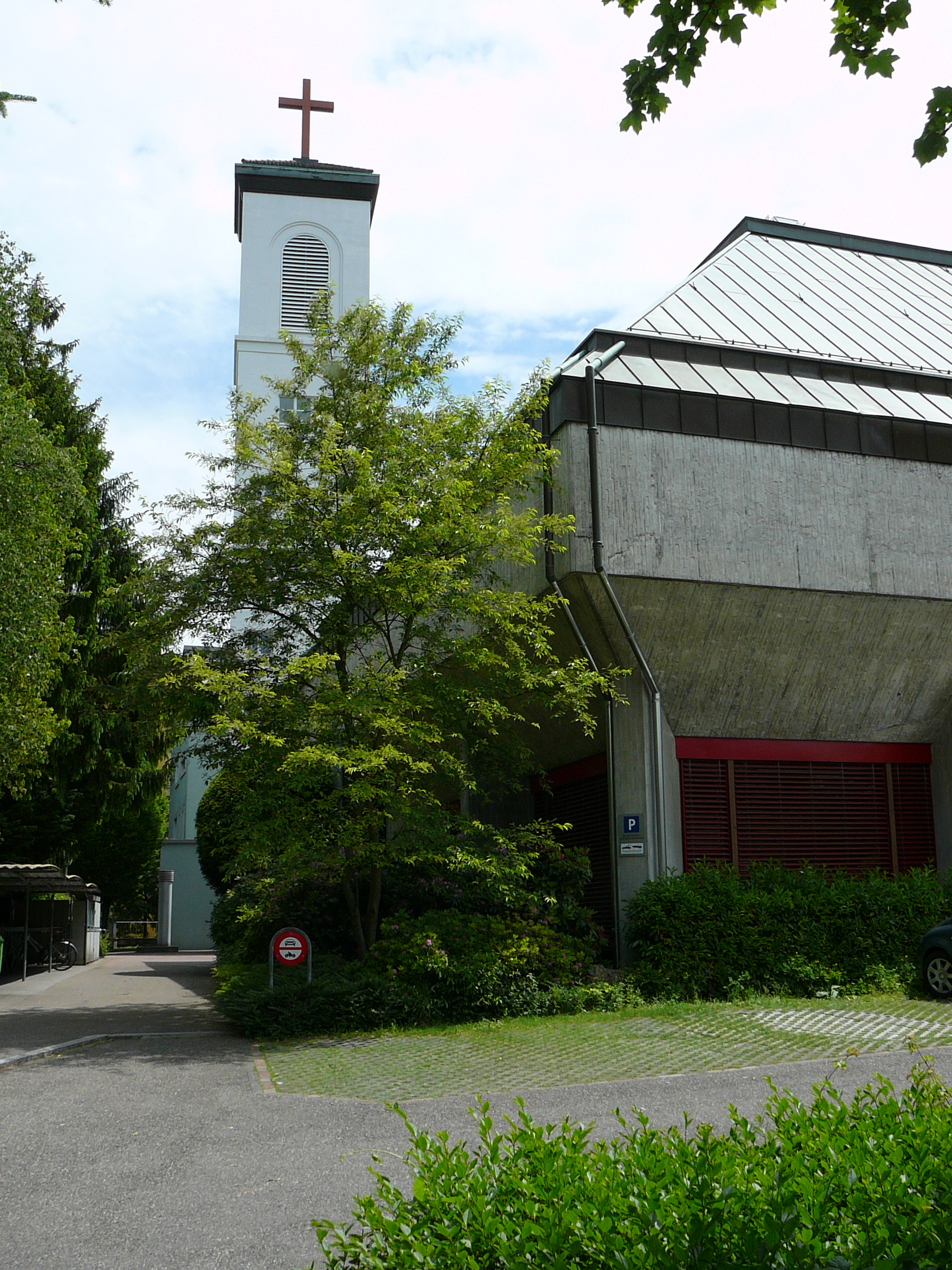 Heilig-Kreuz (Zürich-Altstetten), Kirche von aussen